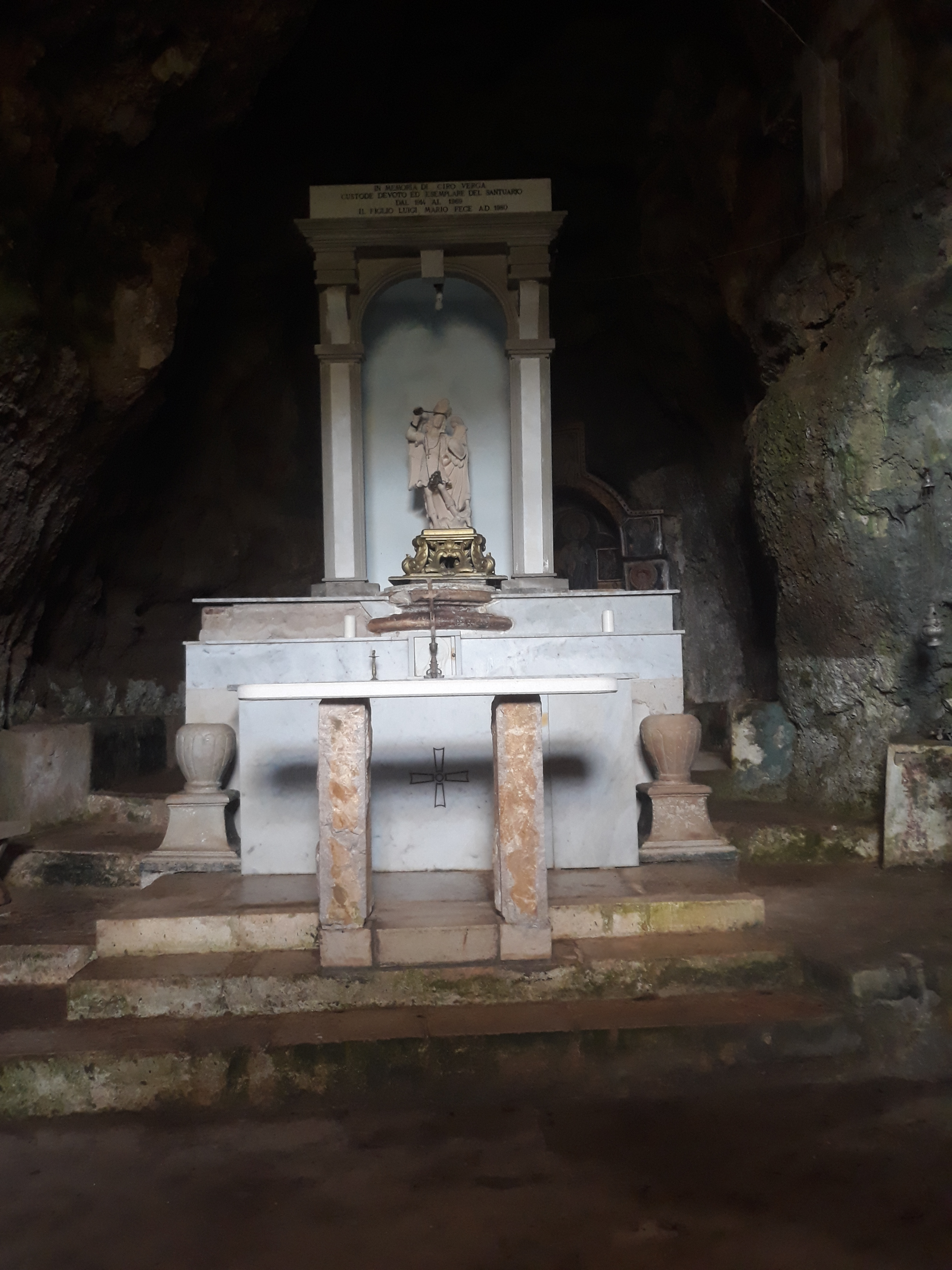 Altare novecentesco aggiunto nell'Eremo